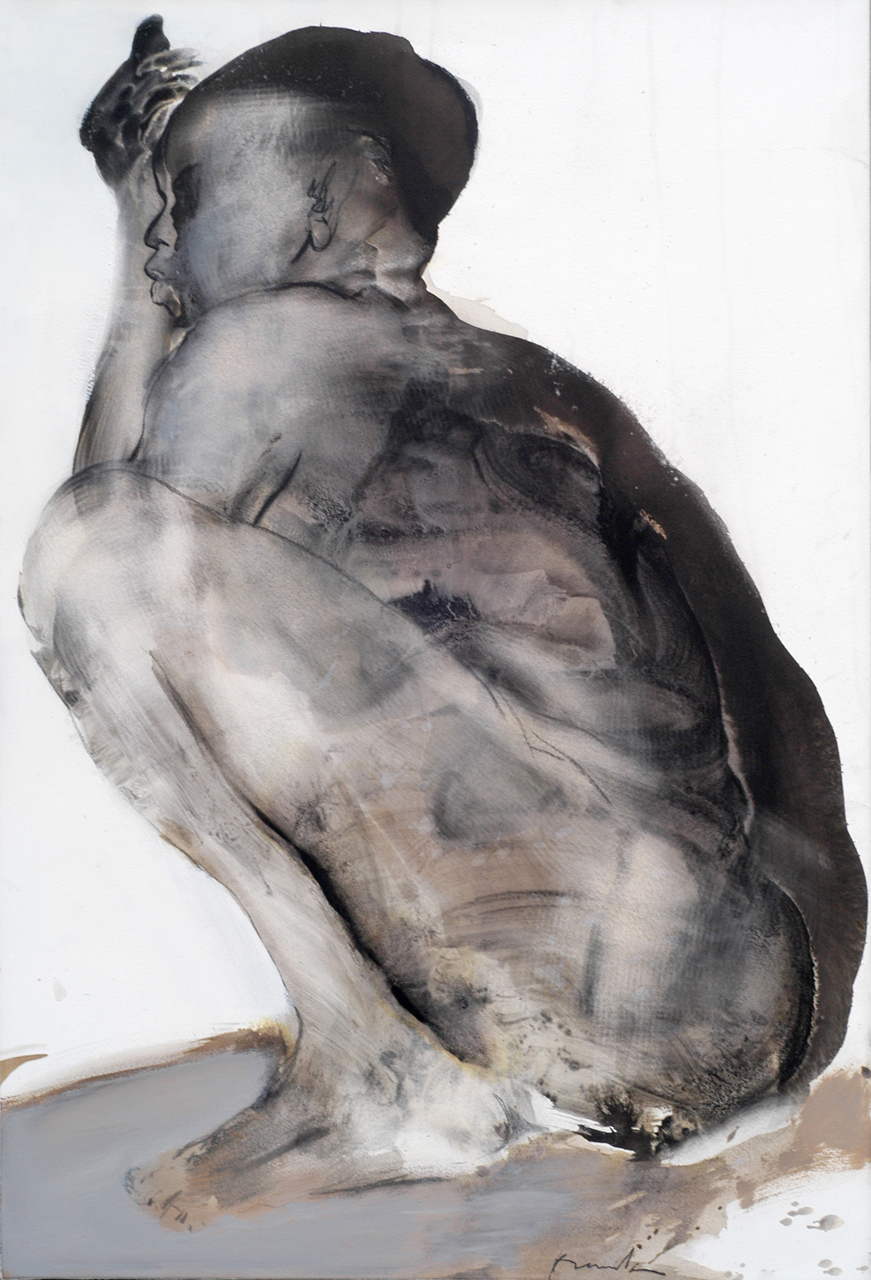 Franta, Snílek (2002), čínská tuš na papíru 110 x 75 cm